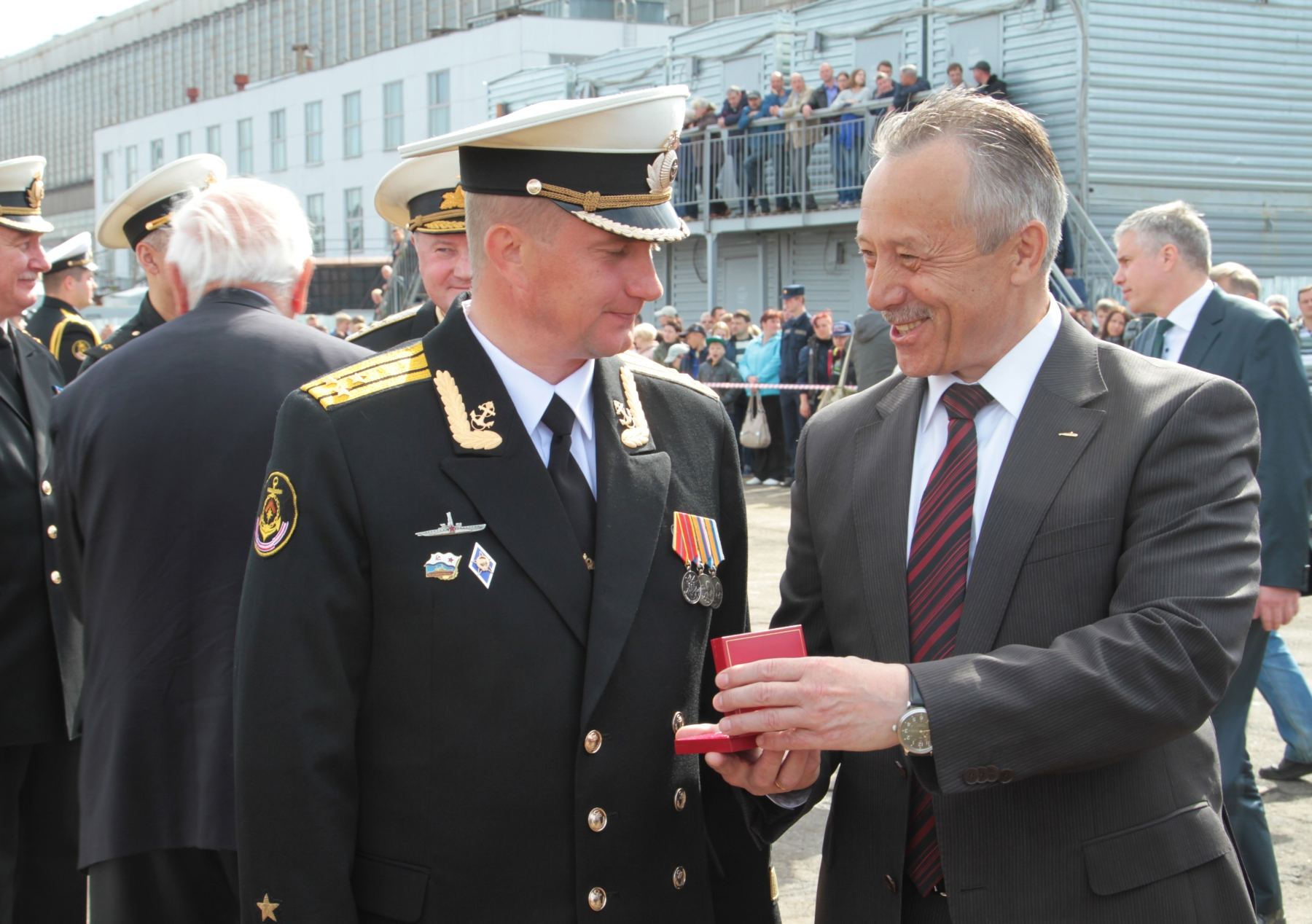 Сергей Митяев (Командир АПРК "Северодвинск") и Михаил Гмырин (мэр Северодвинска). Передача АПРК "Северодвинск" Военно-морскому флоту России.